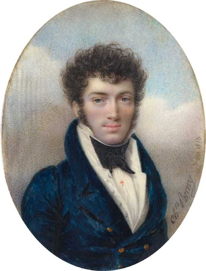 Portrait de Pierre Jean Baptiste François Elleviou, ténor français (1769-1842).